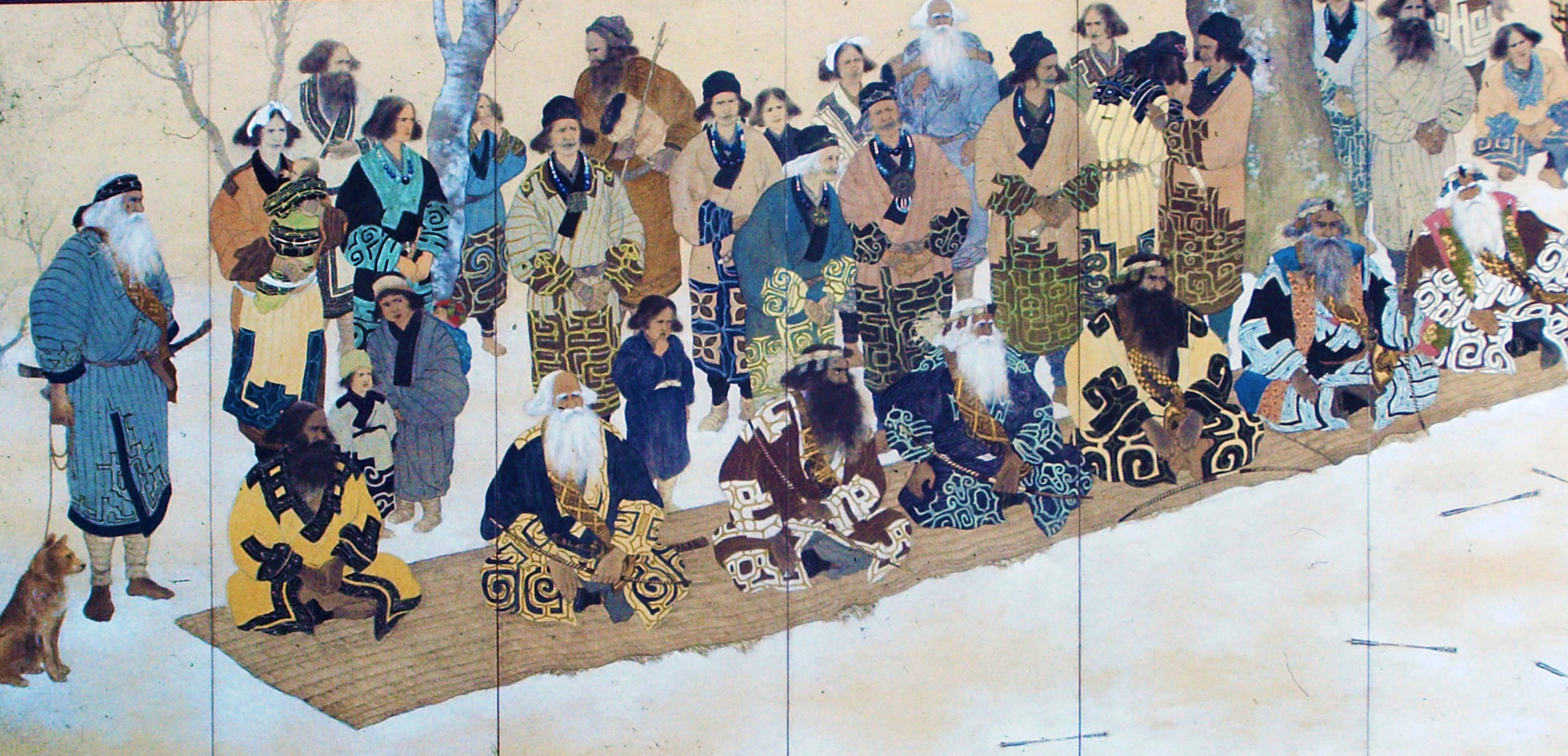 日本画家・村瀬義徳による「アイヌ熊祭屏風」（左）市立函館博物館蔵。肉筆画。大正七年